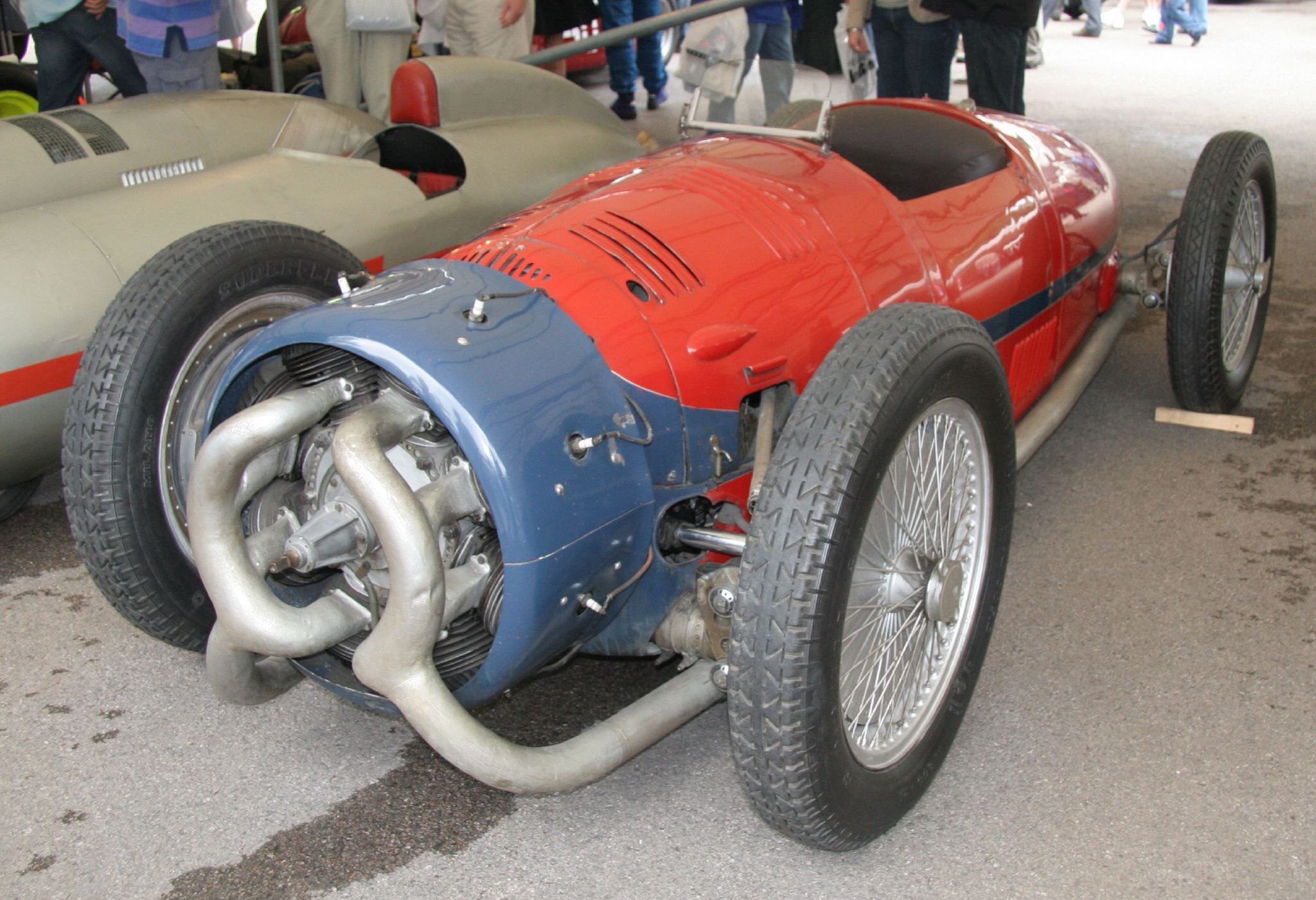 Monaco-Trossi 1935Monaco-Trossi 1935